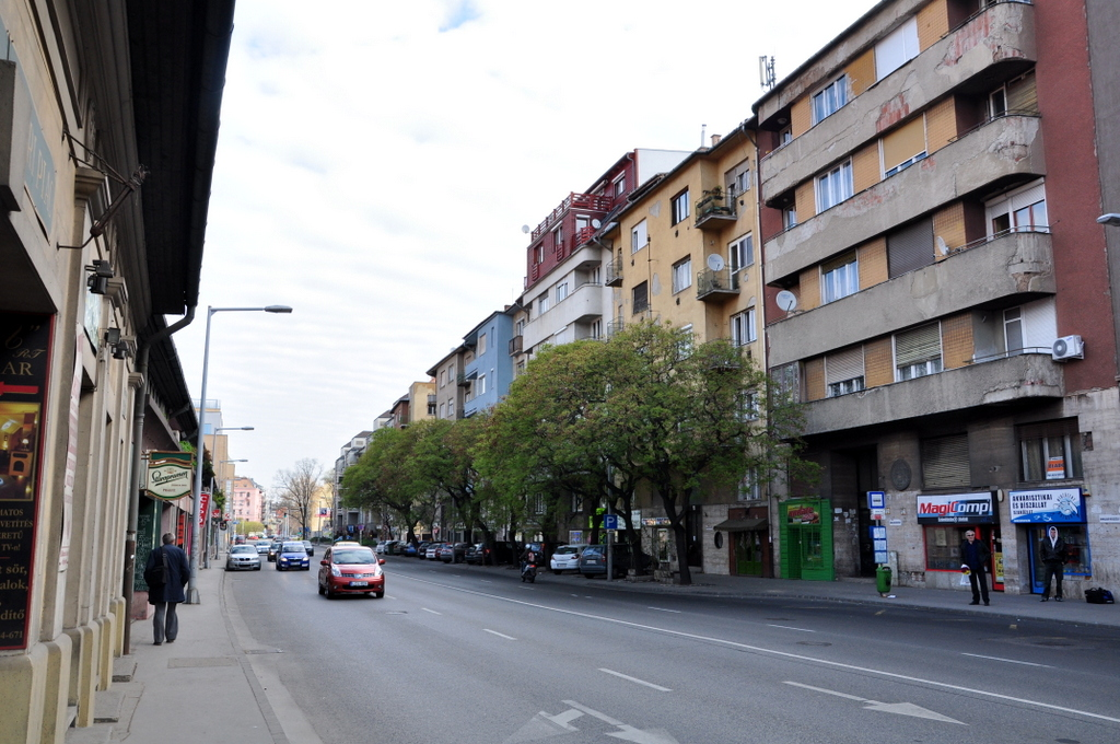 Lajos utca, Budapest District III